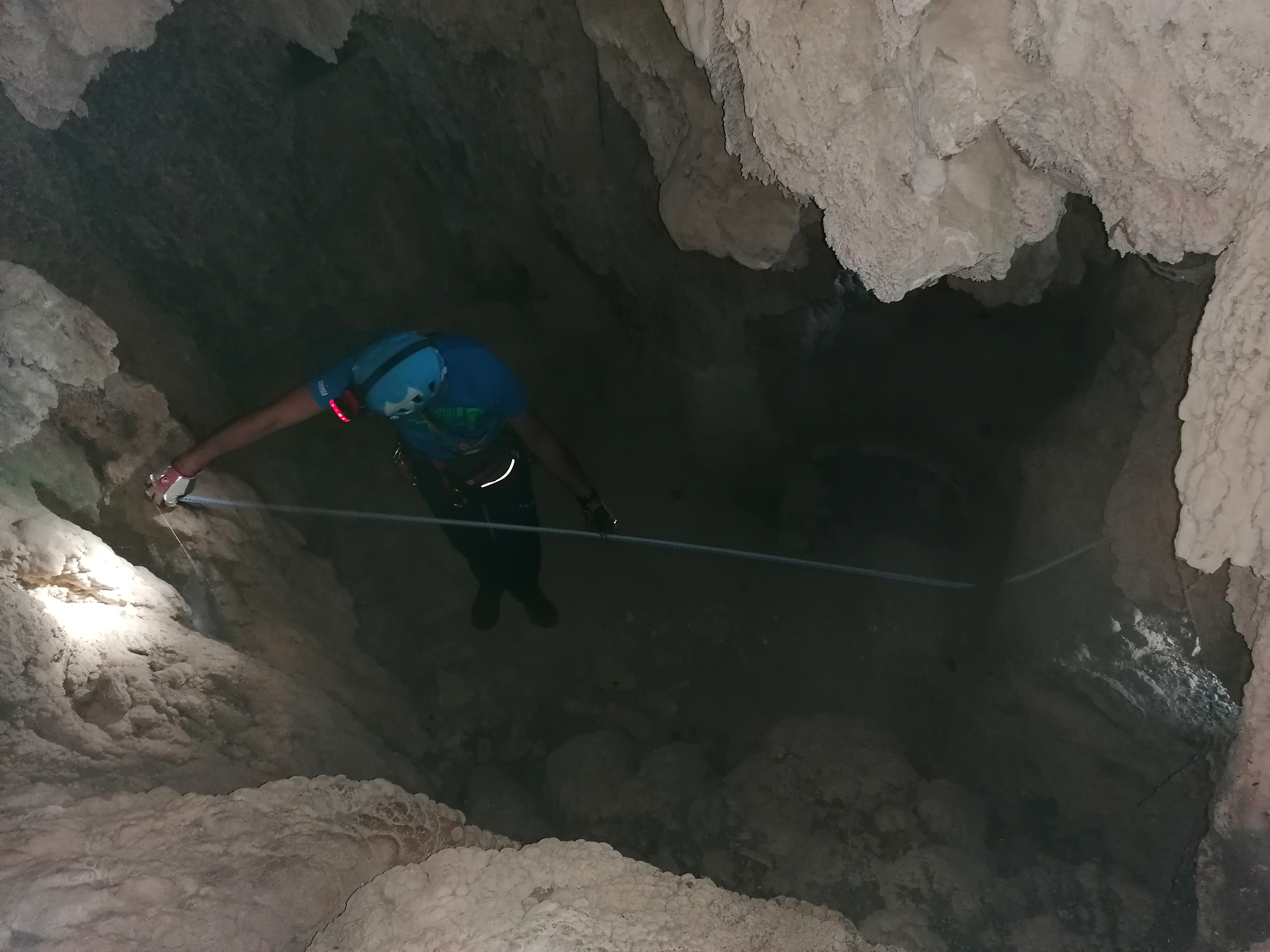 Εσωτερικό του σπηλαίου "Σαράντα Κάμαρες"